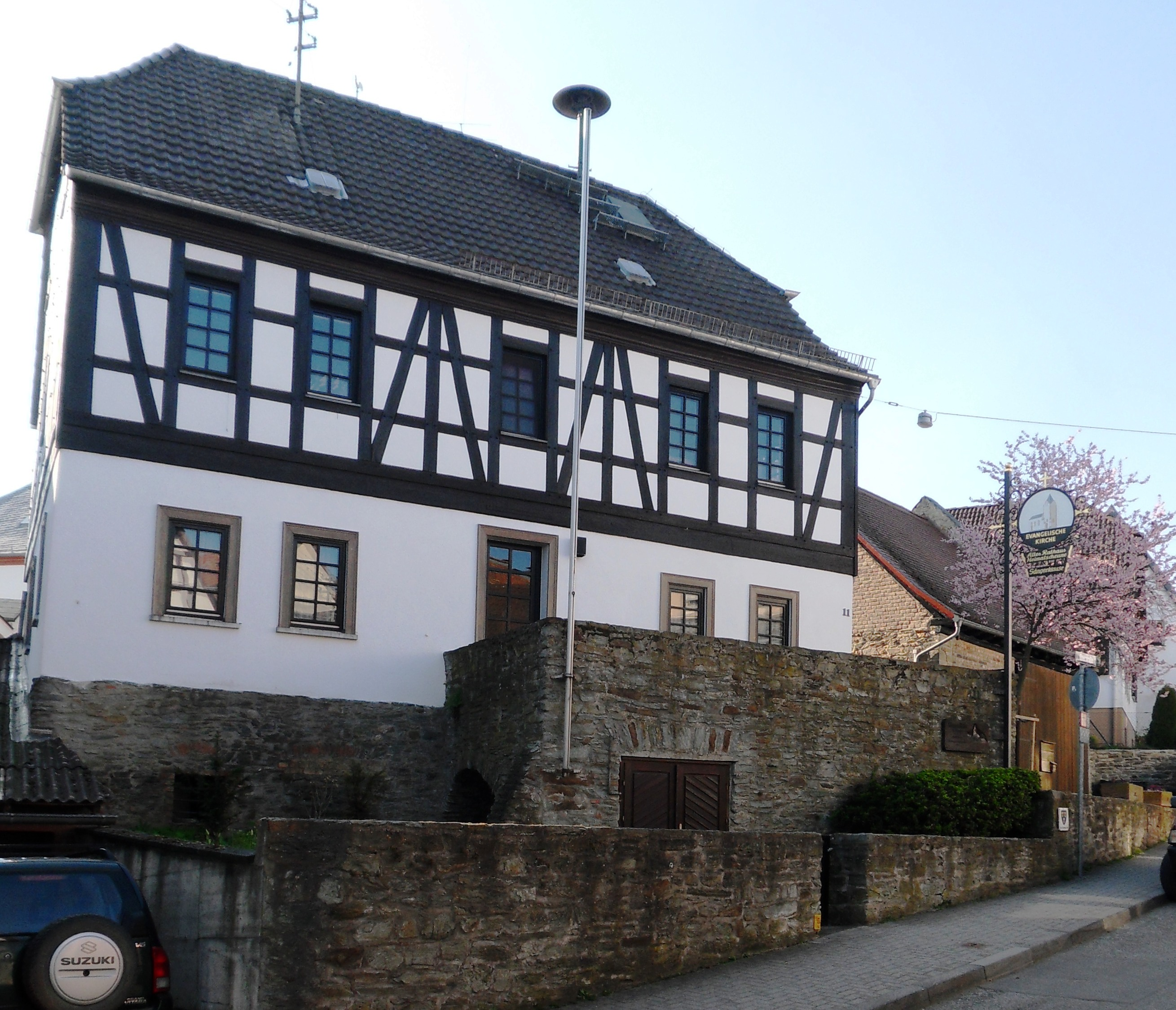 Altes Rathaus in Wiesbaden-Kloppenheim, Oberstraße, Blick von Osten.